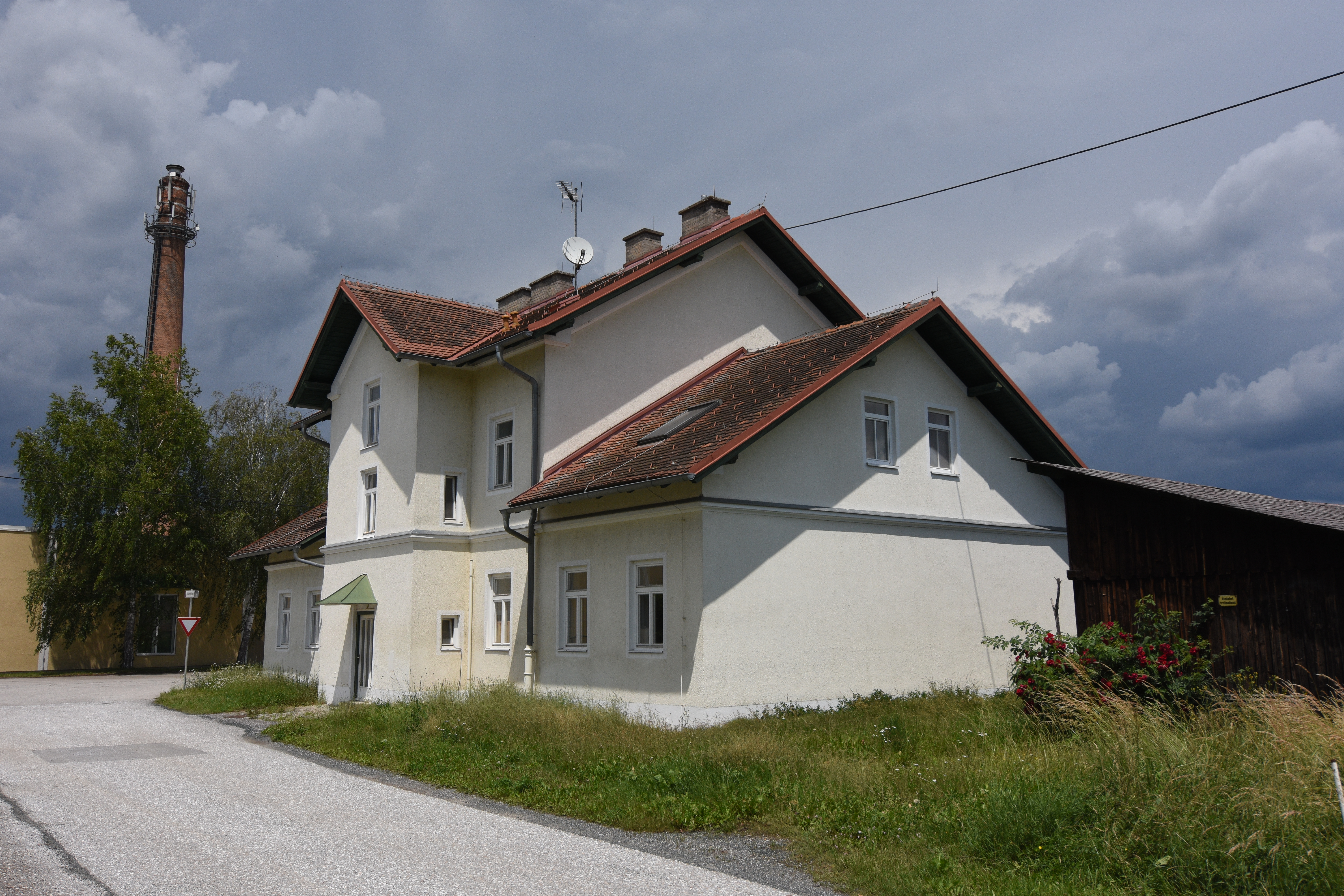 Umgebautes ehemaliges Bahnhofsgebäude Neudau der Lokalbahn Bierbaum–Neudau